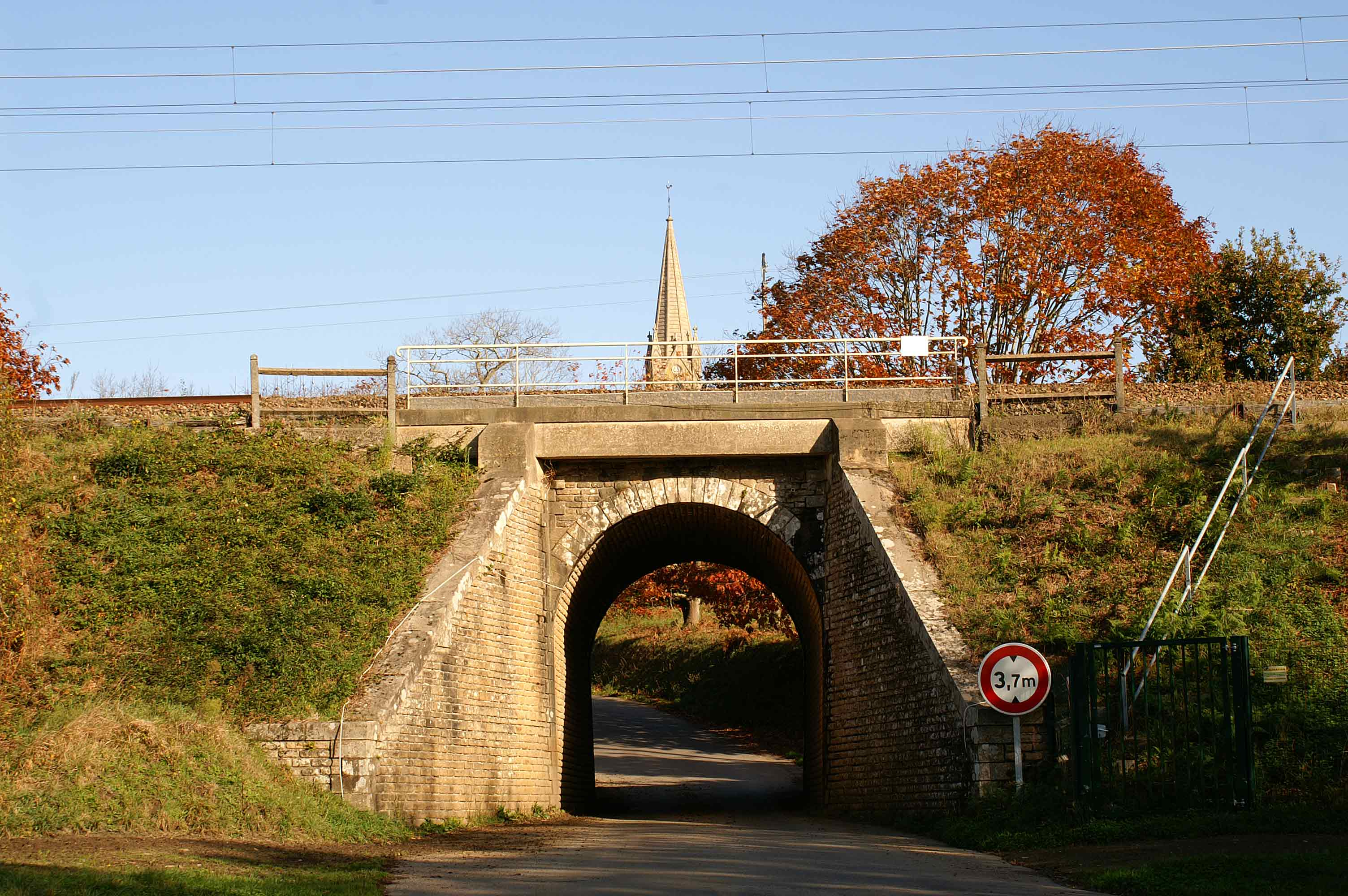 Entrée du bourg de Saint-Jacut-les-Pins par la départementale 137, pont du chemin de fer de la ligne Savenay - Landerneau, et emplacement supposé de l'arrêt SNCF ouvert après la fermeture de la gare et maintenant également fermé.